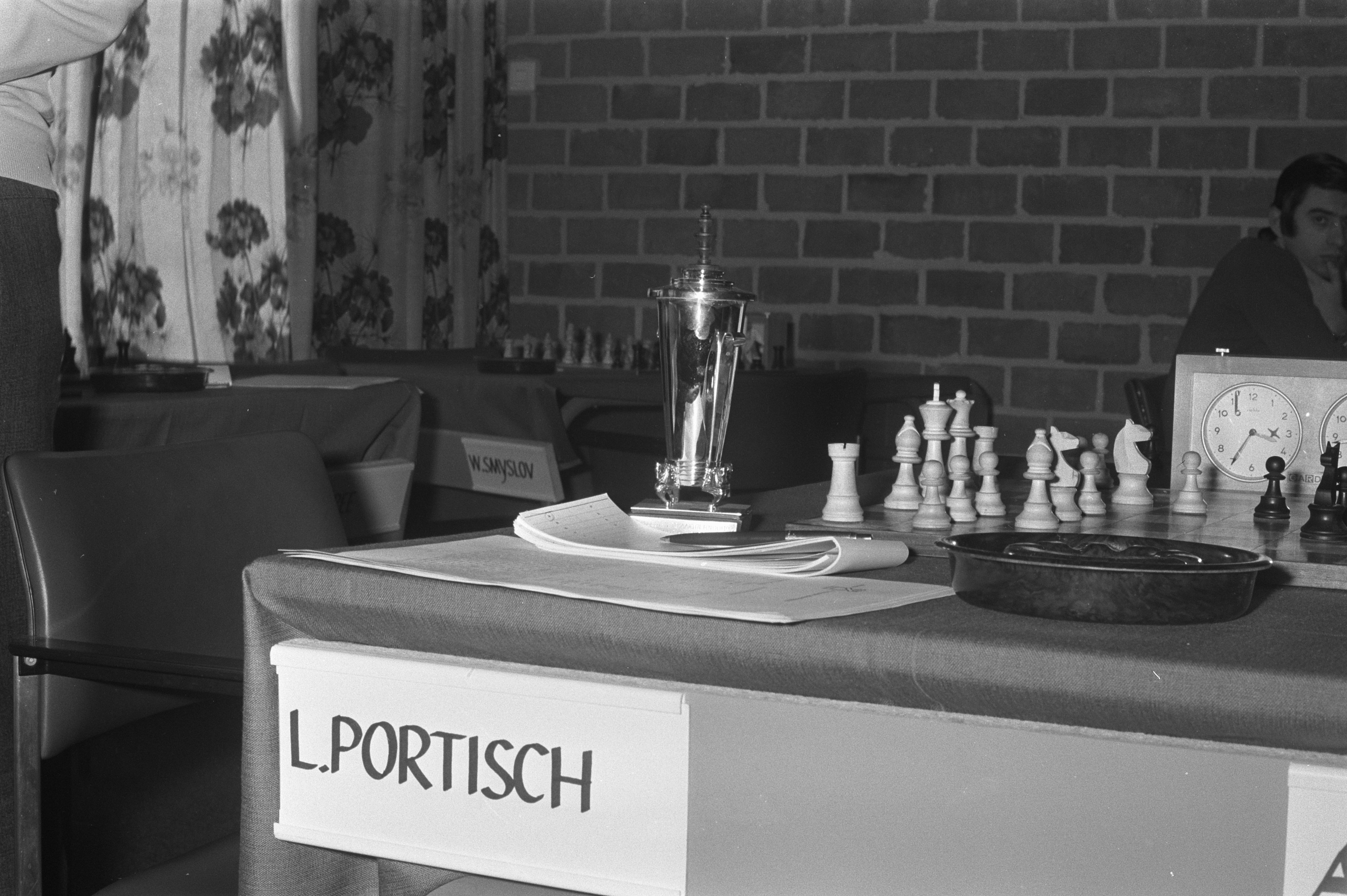 Collectie / Archief : Fotocollectie Anefo Reportage / Serie : [ onbekend ] Beschrijving : Hoogovenschaaktoernooi in Wijk aan Zee Datum : 25 januari 1972 Locatie : Noord-Holland, Wijk aan Zee Trefwoorden : schaken Instellingsnaam : Hoogovenschaaktournooi Fotograaf : Peters, Hans / Anefo Auteursrechthebbende : Nationaal Archief Materiaalsoort : Negatief (zwart/wit) Nummer archiefinventaris : bekijk toegang 2.24.01.05 Bestanddeelnummer : 925-3363